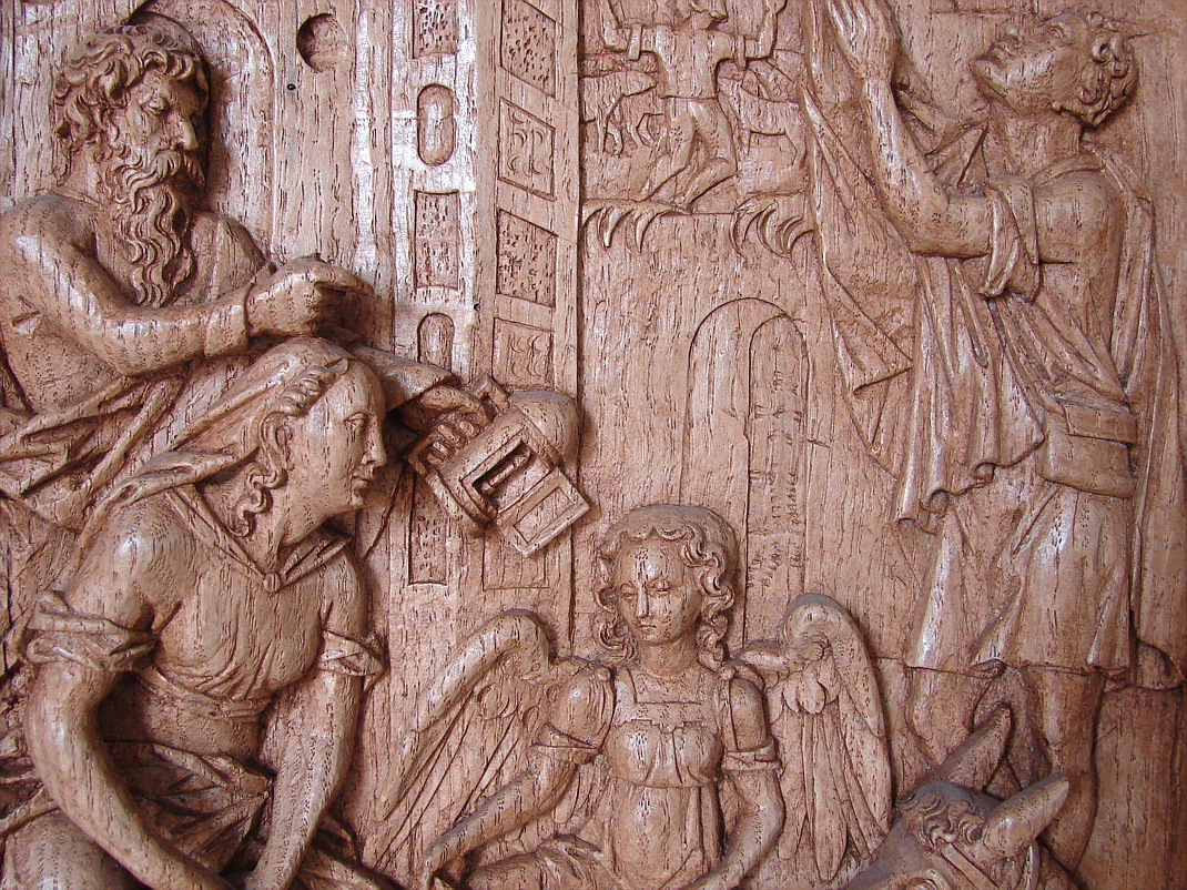 Höör kirke, detalje fra prædikestol, Höör, Skåne